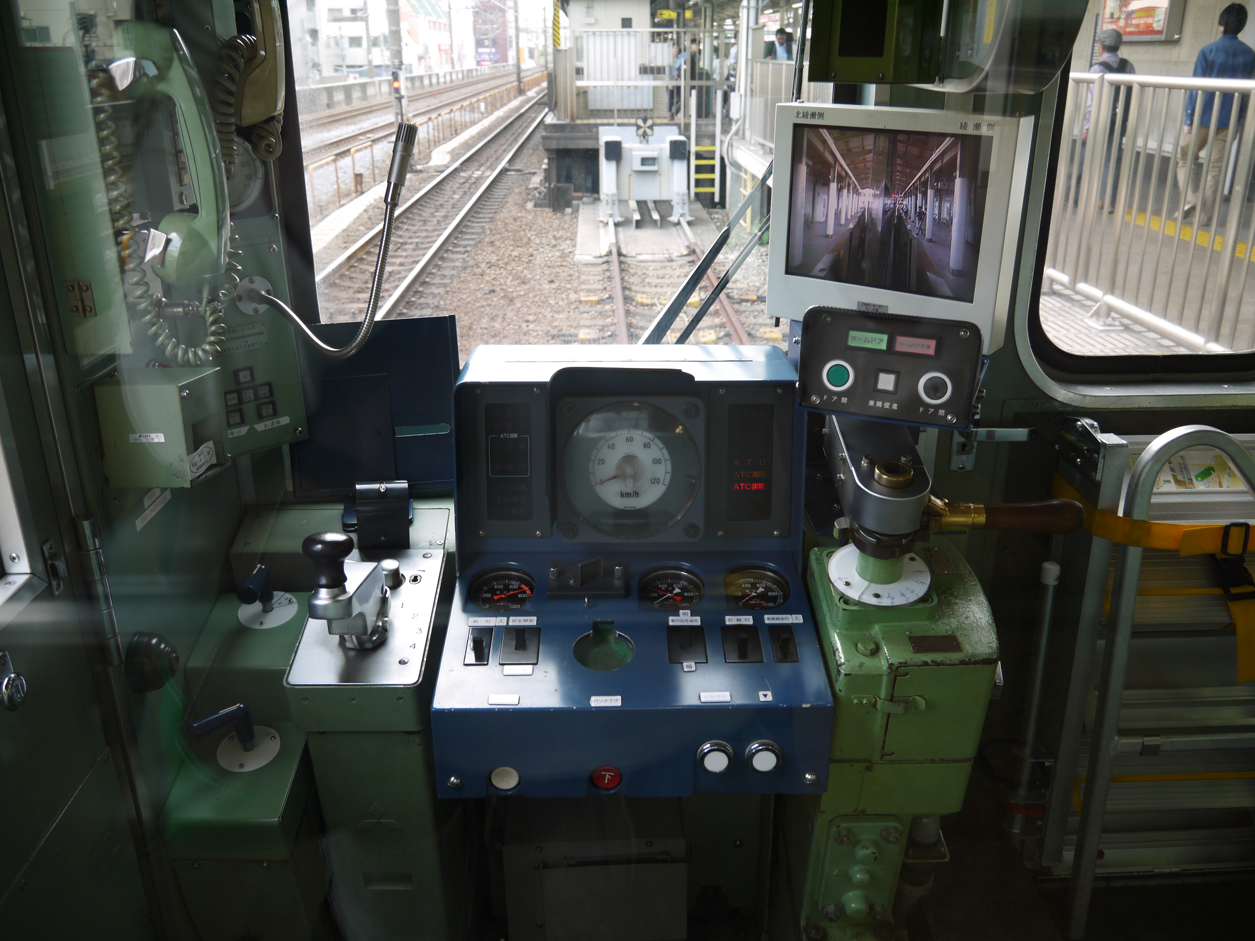 営団5000系電車 運転台（北綾瀬支線用） 車番：5951